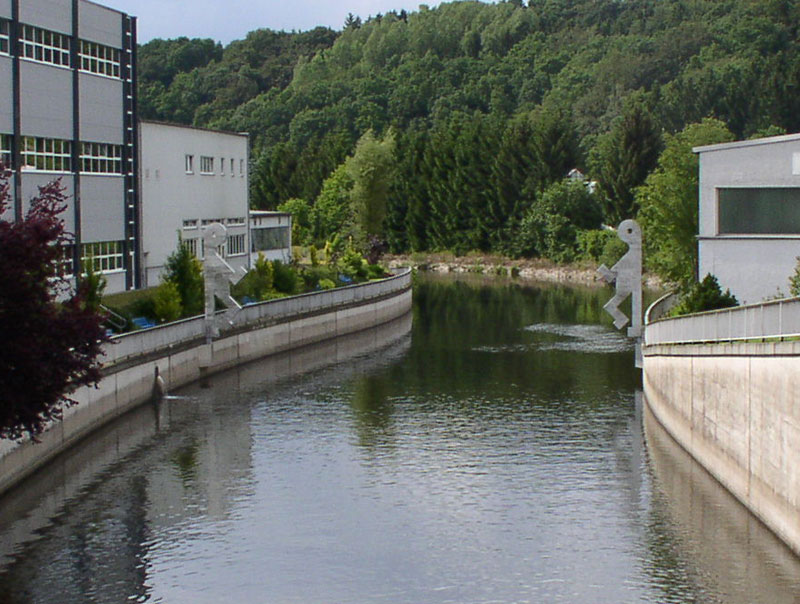 Hückeswagen-Brücke: Kunstwerk am Fluss